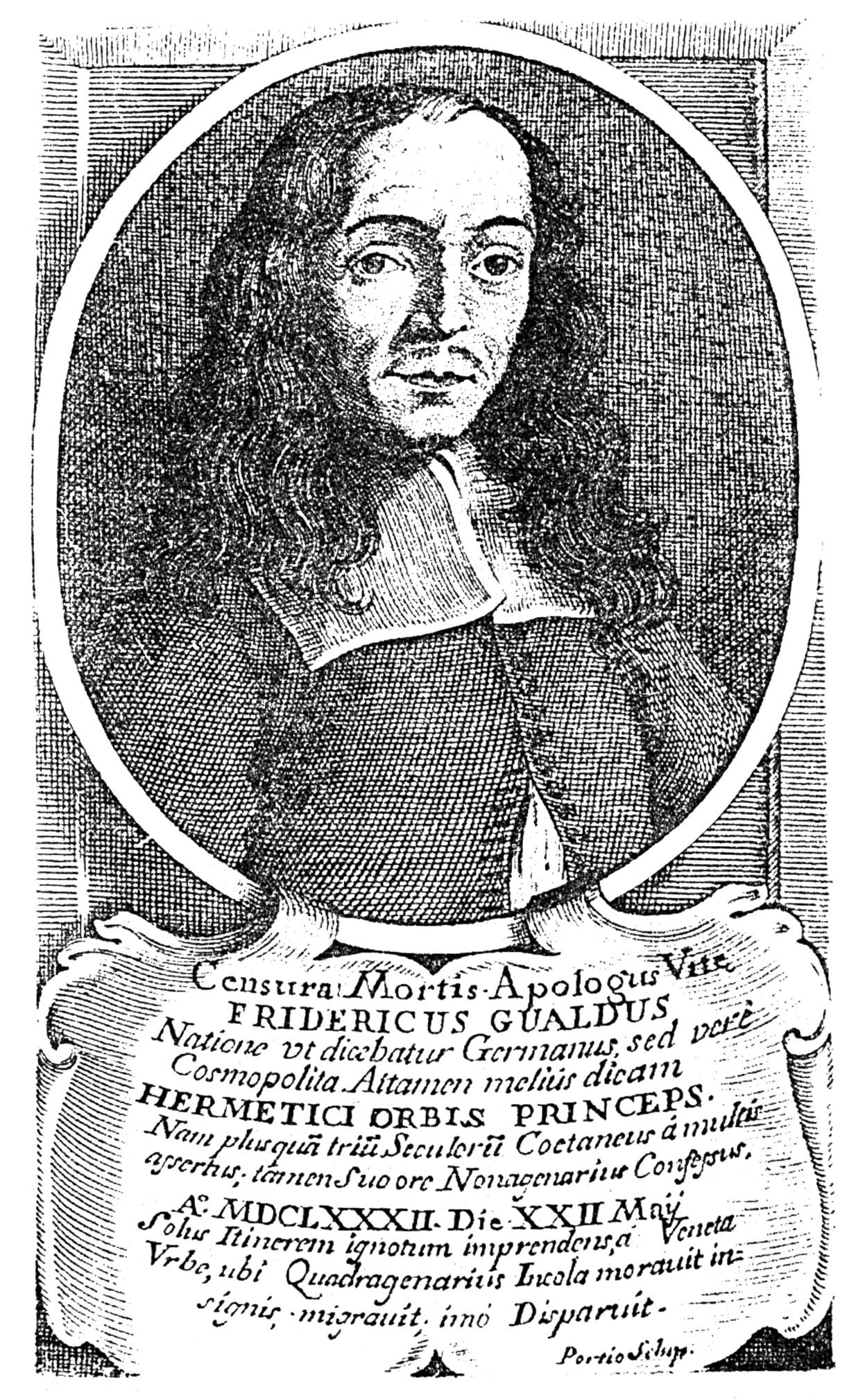 Cette image est une reproduction d'un tableau peignant Federico Gualdi